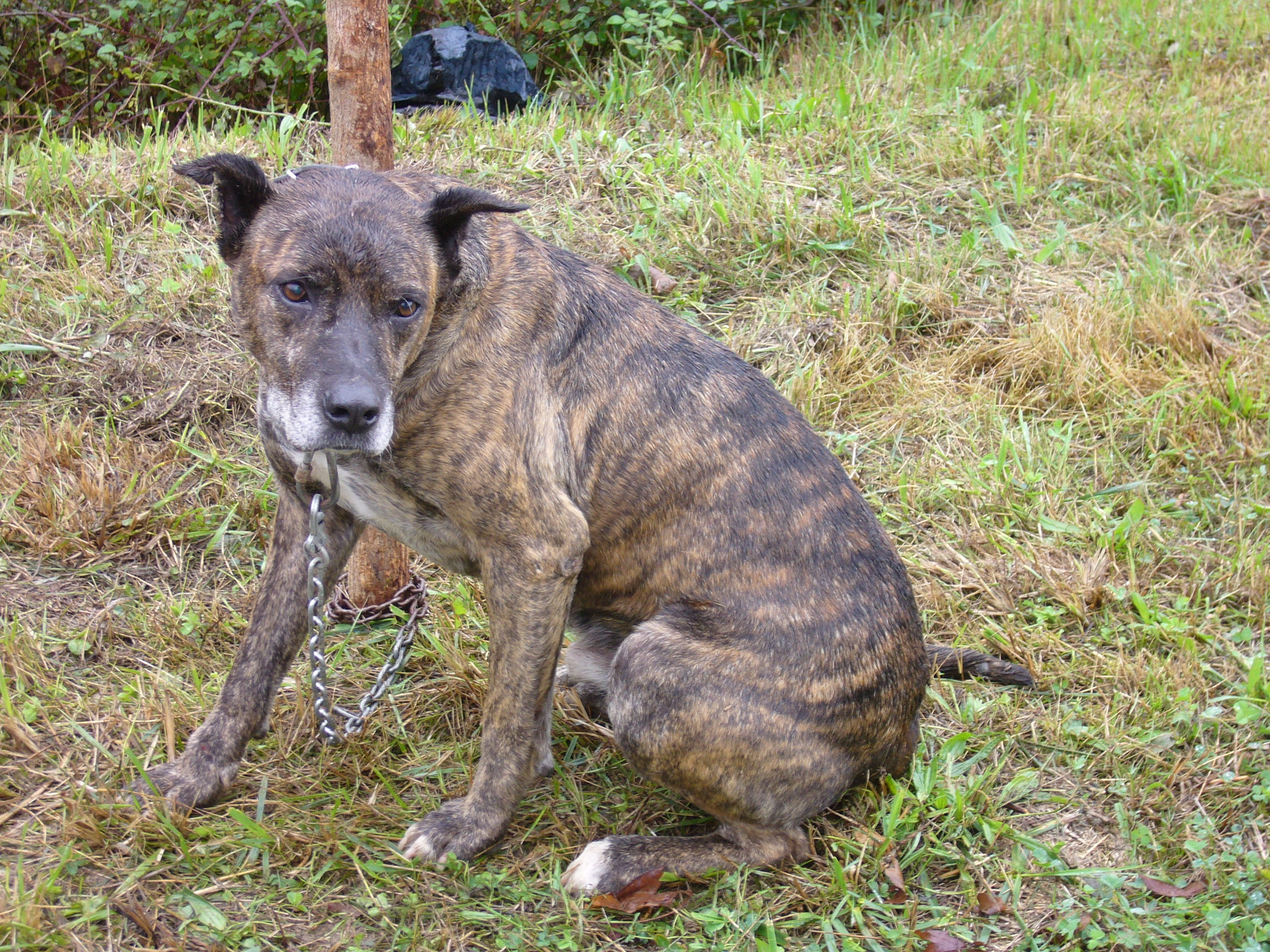 Zakur billanoa Ormaiztegin